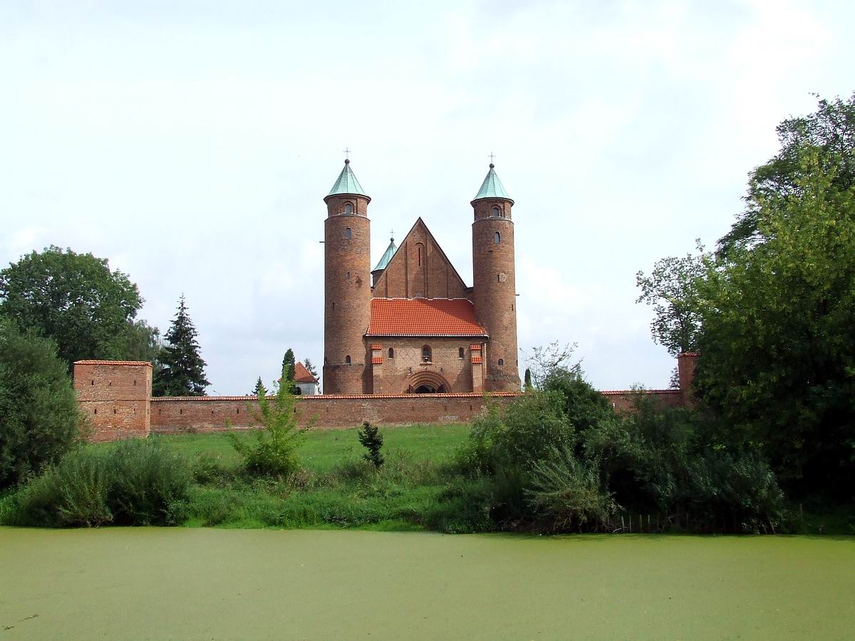 Brochów, kościół obronny z XVI w, gdzie ślub brali rodzice Fryderyka Chopina i gdzie był chrzczony